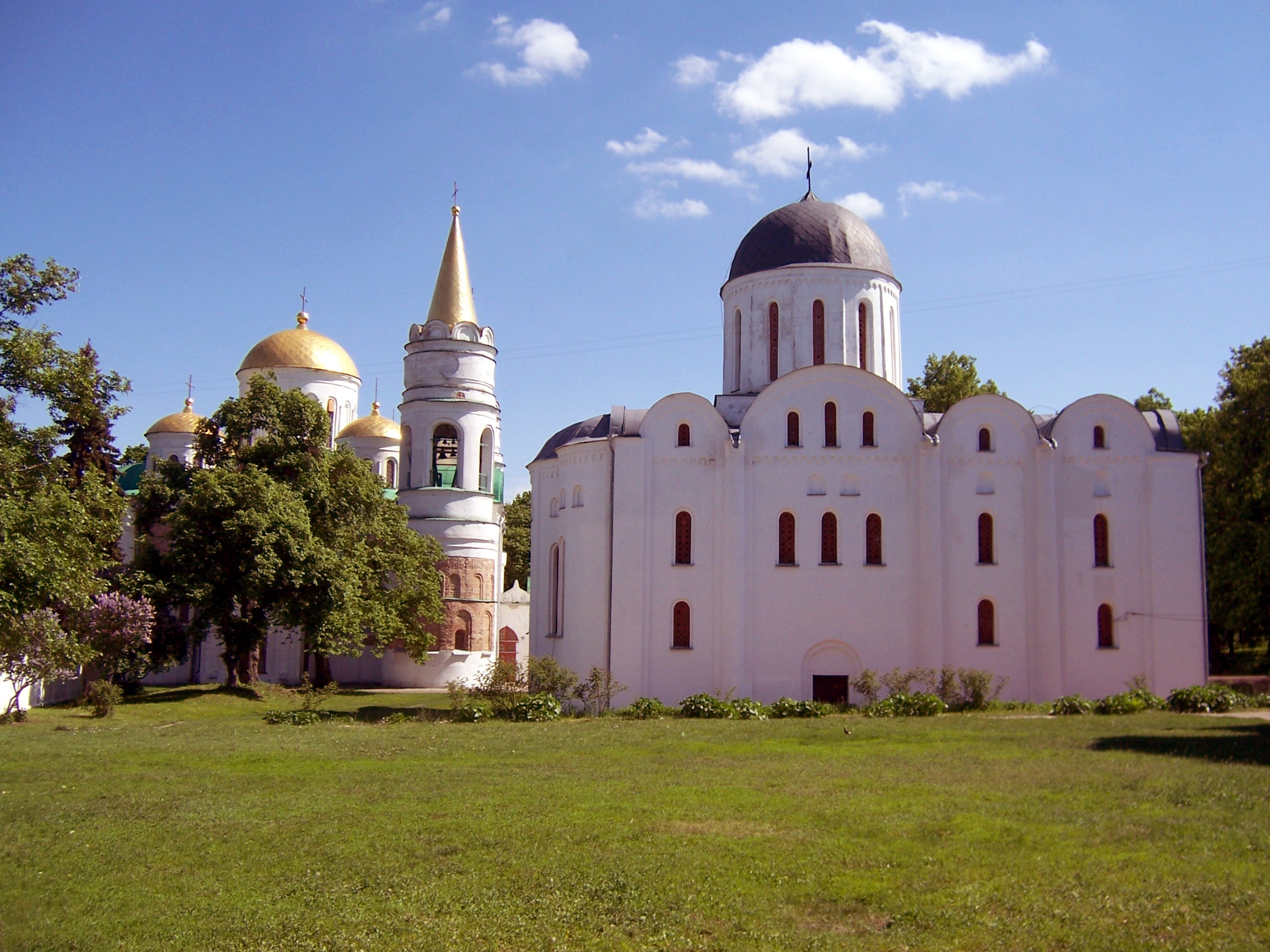 Boris-und-Gleb-Kathedrale (12. Jh., r.) und Christi-Verklärungs-Kathedrale (11. Jh., l.) in Tschernihiw, Ukraine, von Norden